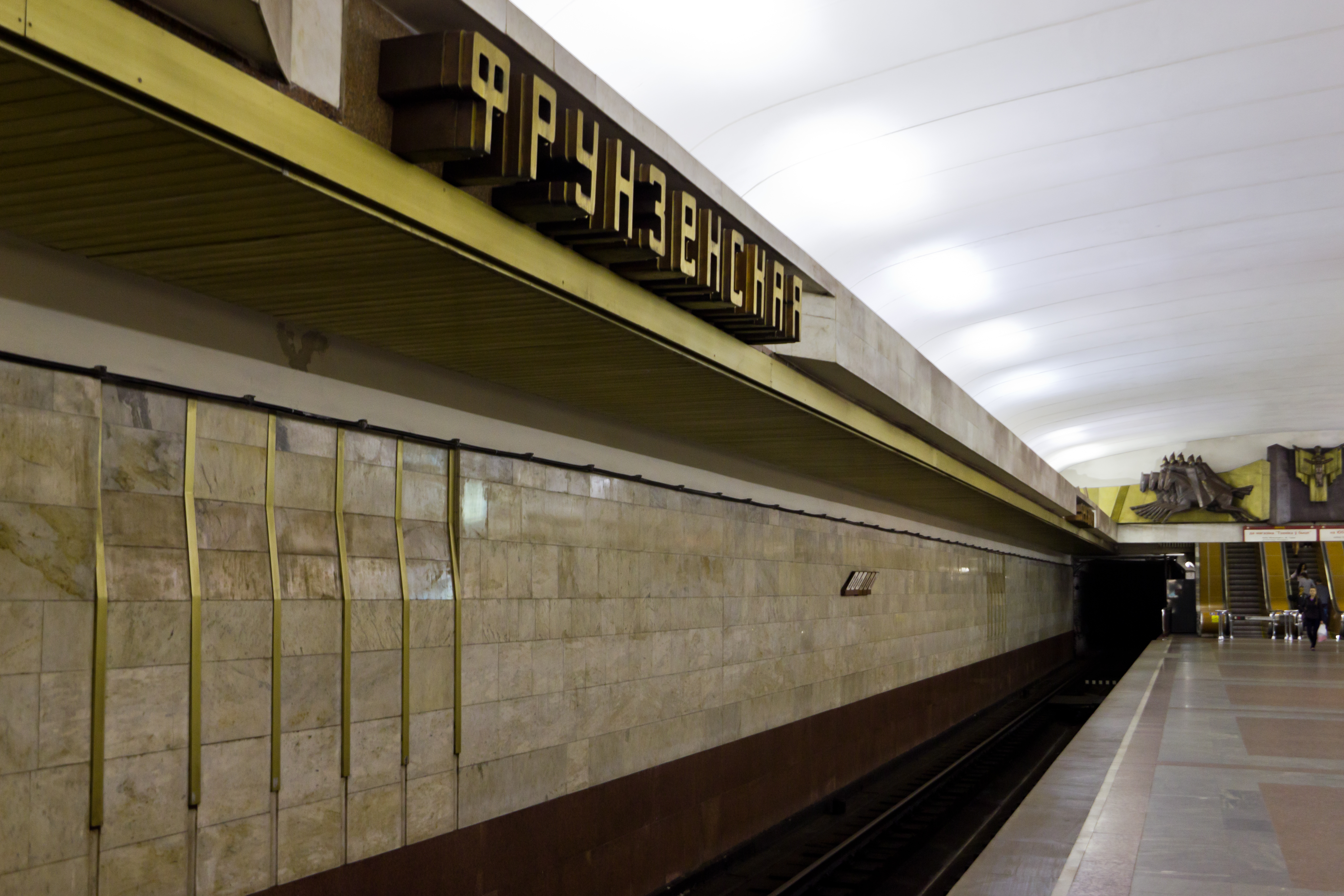 Станция метро «Фрунзенская», Минск